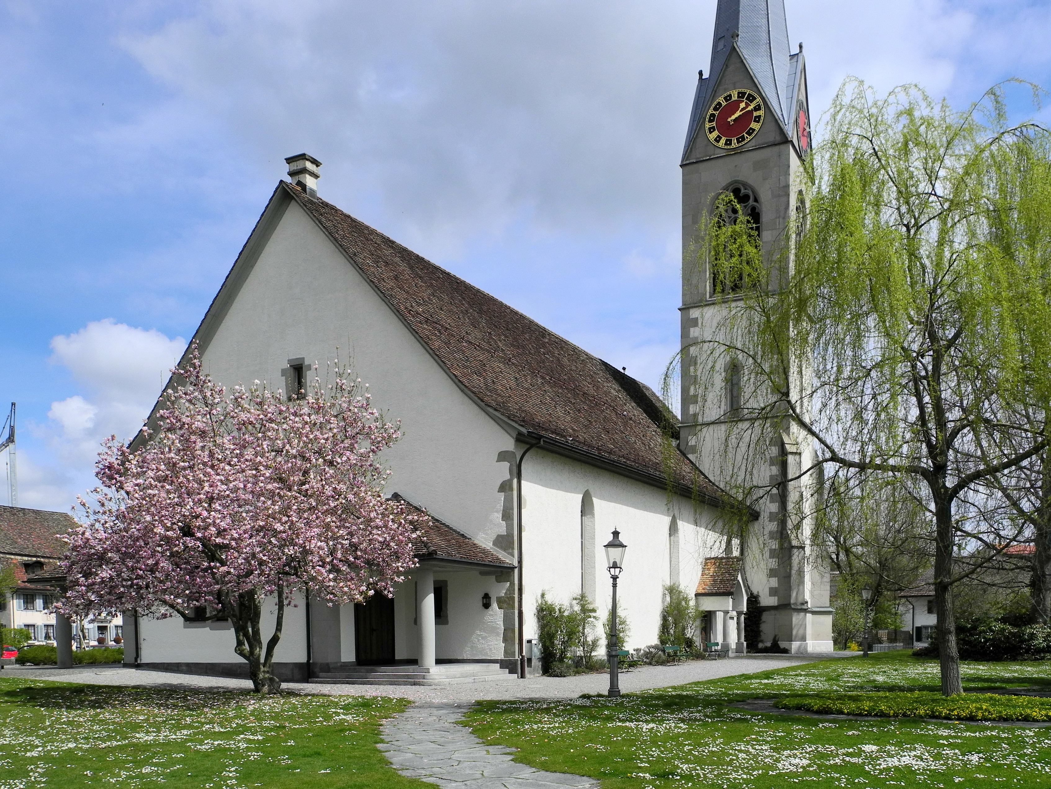 Reformierte Kirche in Pfäffikon (Switzerland)